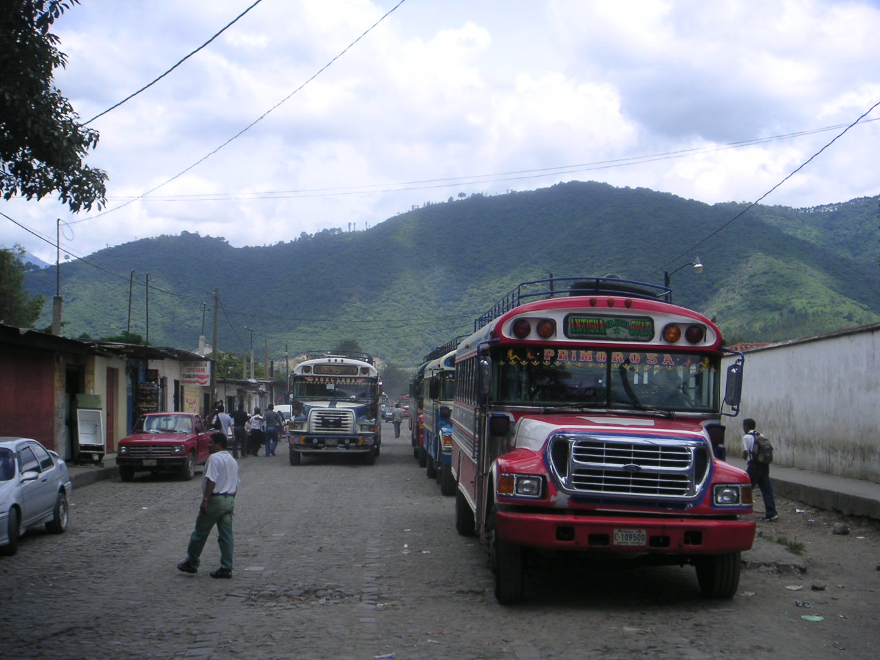 Antigua, Guatemala. Photo: Soman